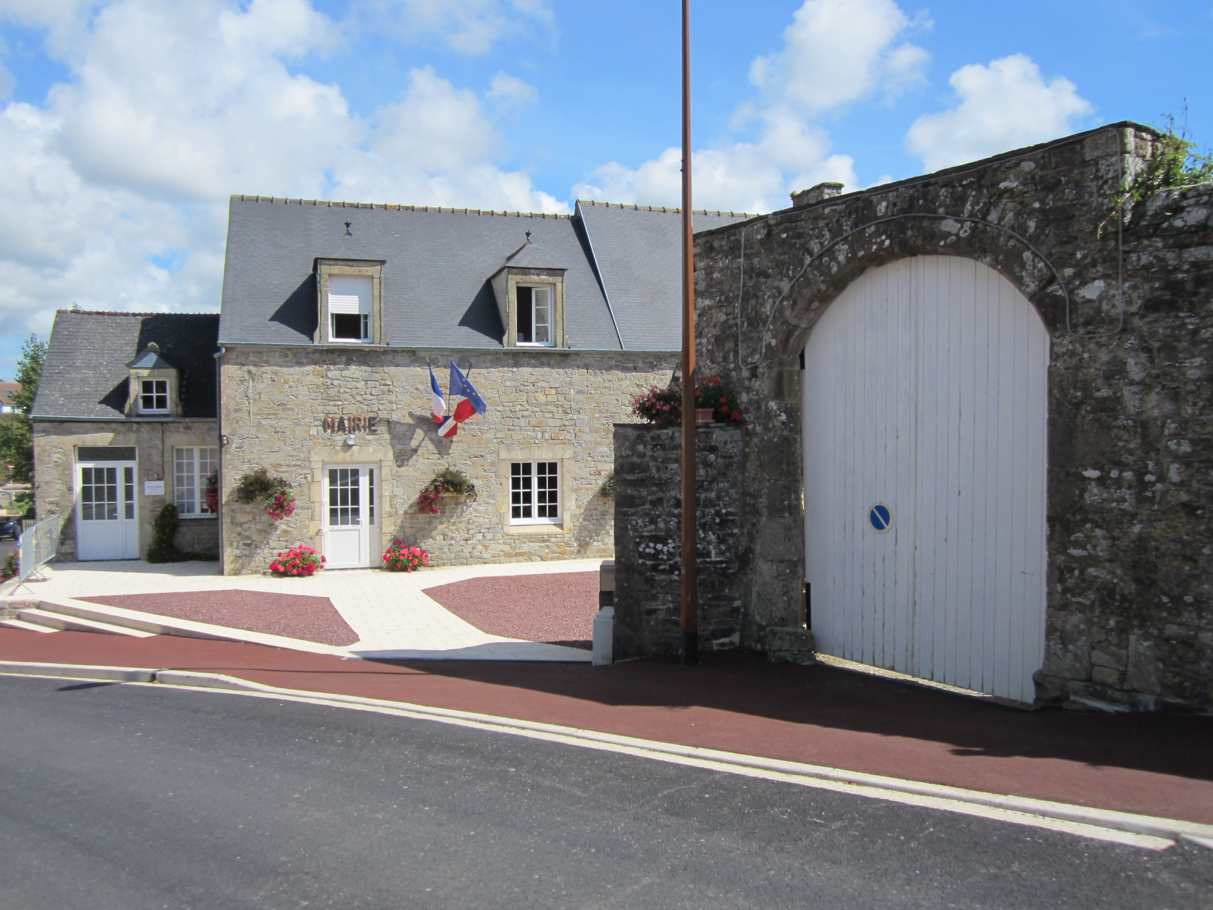 Église Notre-Dame de Pierreville (Manche)